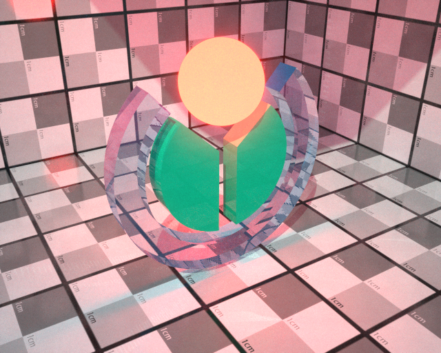 Wikimedia-Logo, erstellt in Blender 2.45.15; gerendert in Indigo. Danach wurden die igi-Rohdaten des Bildes im Violet Tone Mapper bearbeitet. Hierbei wurden verändert: Diffraction limited Bloom White Balance Camera Glare Pre-Scale / Post-Scale / Burn of the Reinhard-Tonemap Das Ergebnis wurde als png abgespeichert.